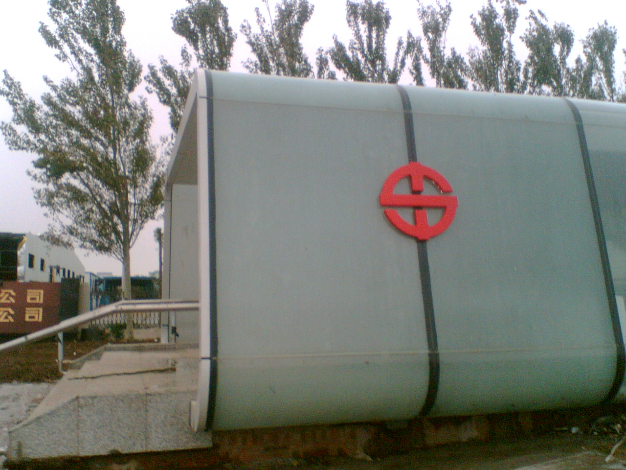 沈阳地铁